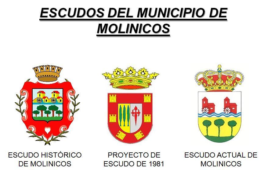 Evolución de los escudos de armas del municipio de Molinicos (Albacete)